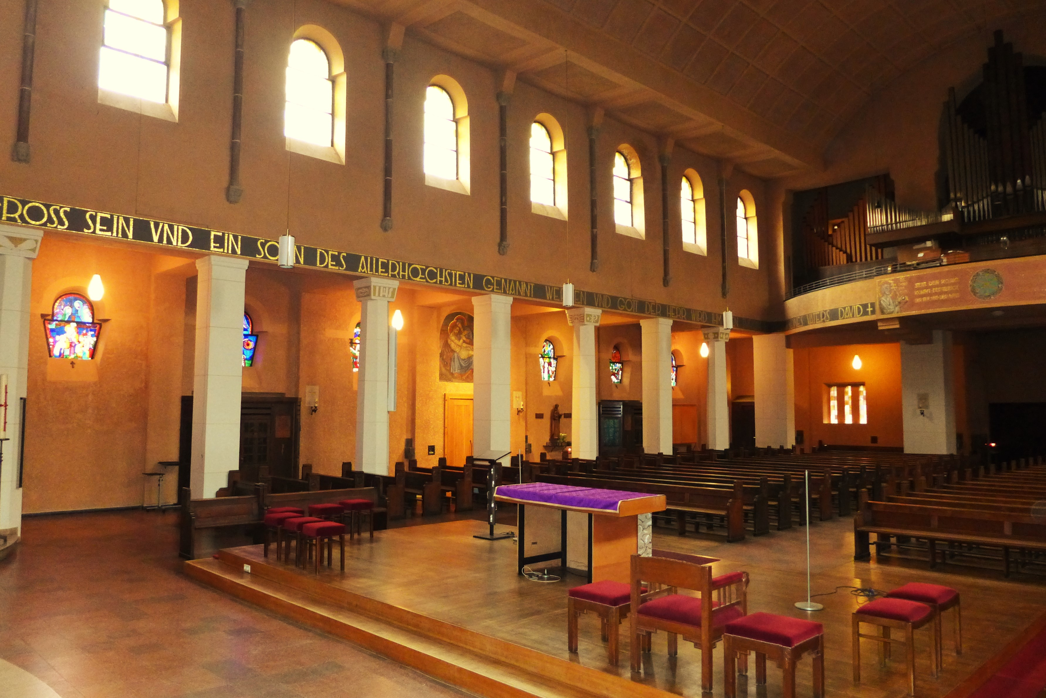 Christkönig-Kirche (Saarbrücken), rechte Mittelschiffarkade